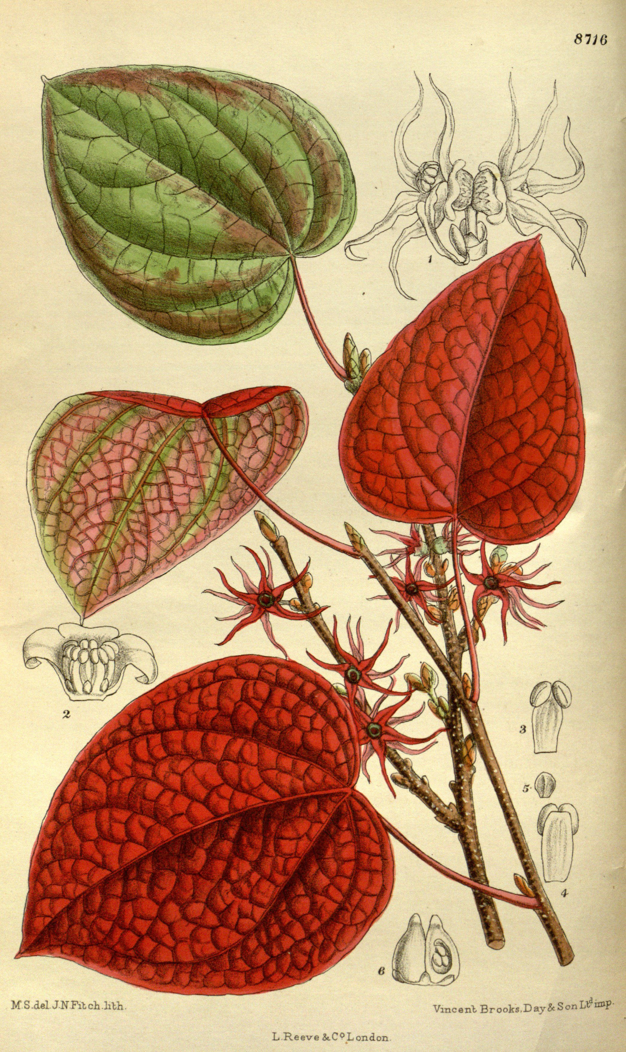 Disanthus cercidifolia (= Disanthus cercidifolius), Hamamelidaceae